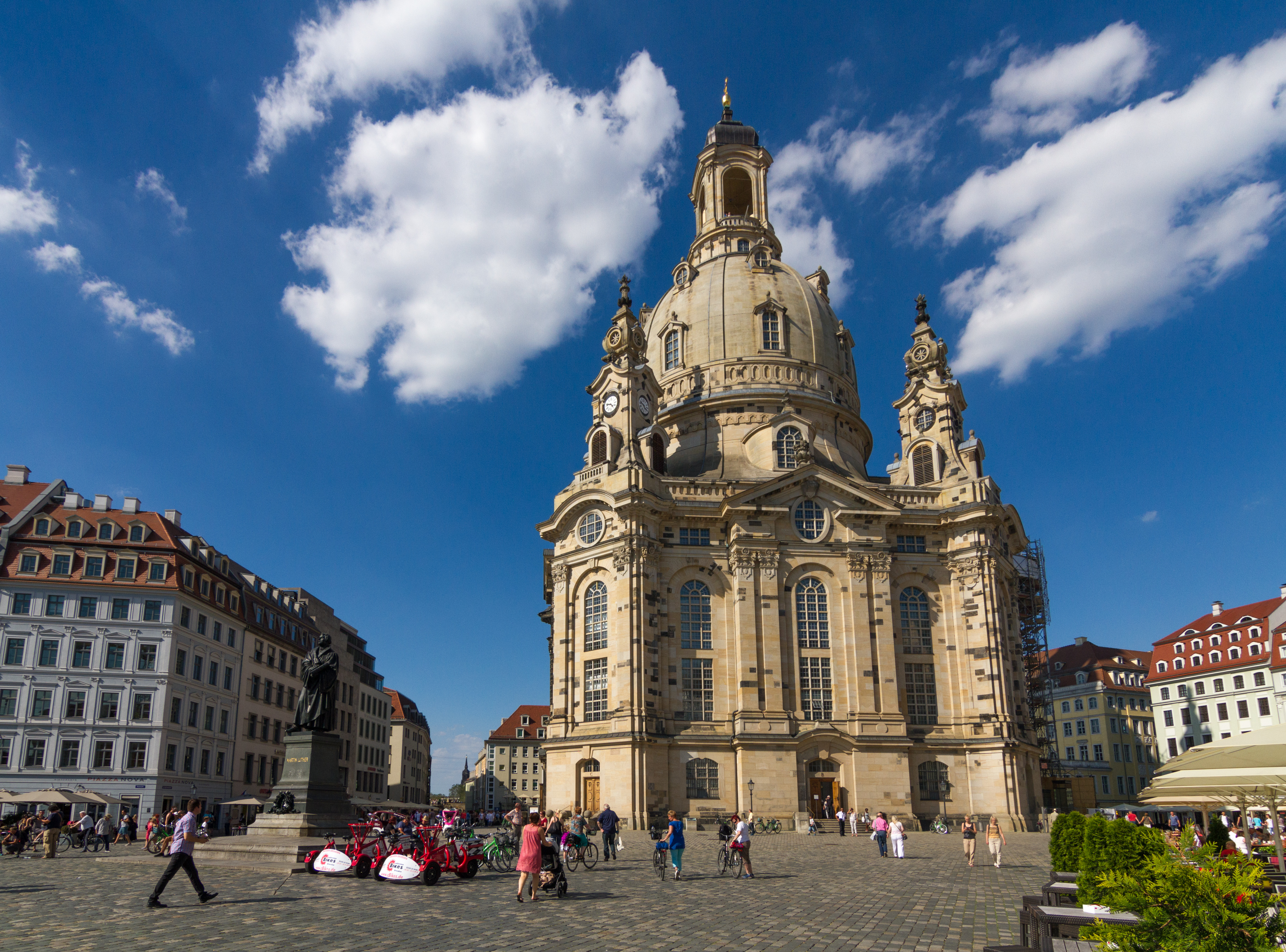 Frauenkirche, Dresden